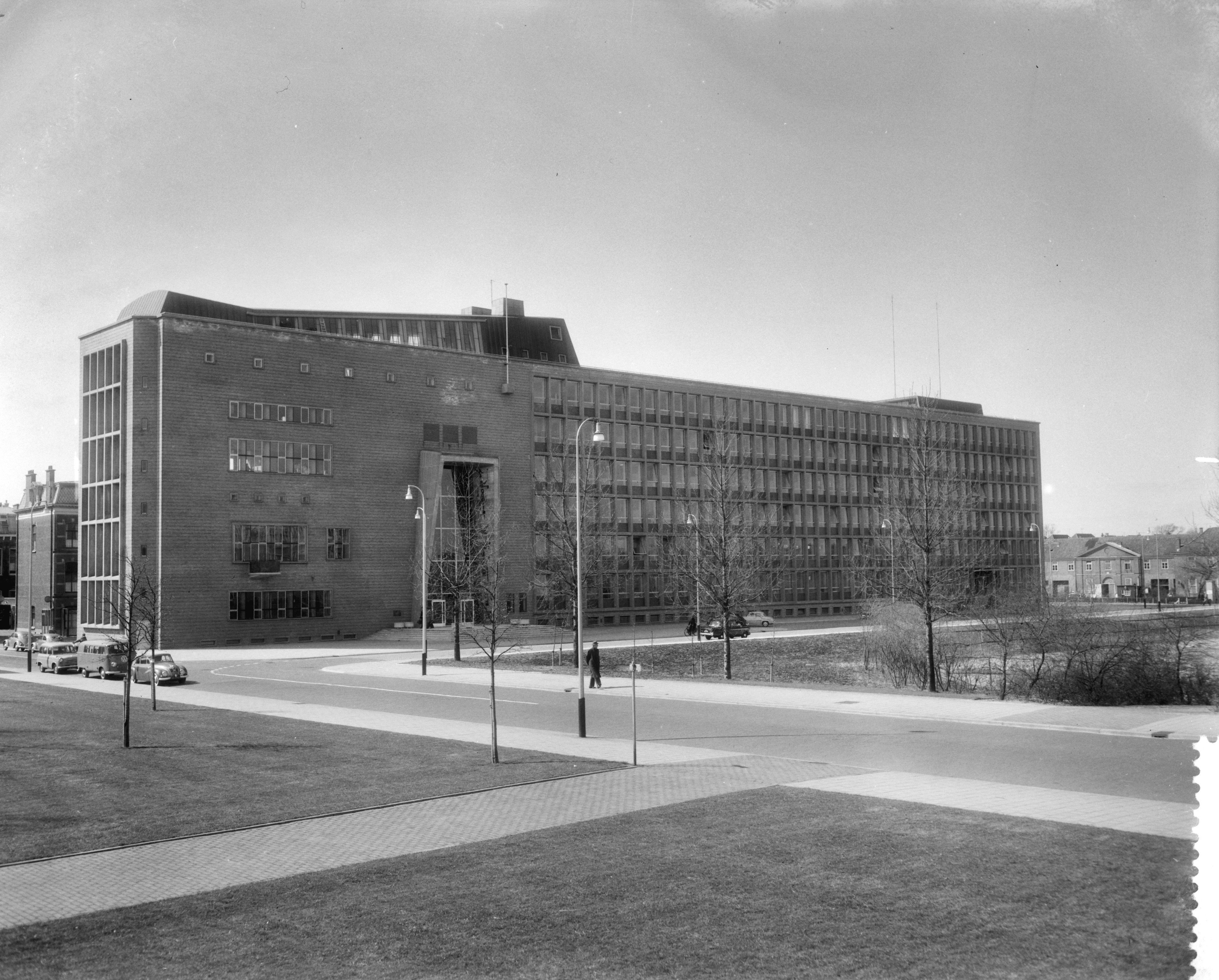 Collectie / Archief : Fotocollectie Anefo Reportage / Serie : [ onbekend ] Beschrijving : Bouw van nieuwe hoofdbureau van politie in Den Haag Datum : 10 april 1959 Fotograaf : Pot, Harry / Anefo Auteursrechthebbende : Nationaal Archief Materiaalsoort : Negatief (zwart/wit) Nummer archiefinventaris : bekijk toegang 2.24.01.04 Bestanddeelnummer : 910-2852